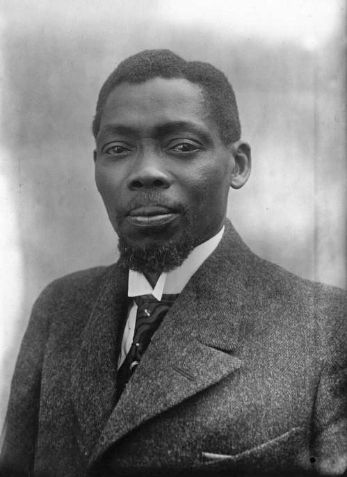 Diagne, député du Sénégal et Ht Commissaire du Congrès Pan Noir : photographie de presse